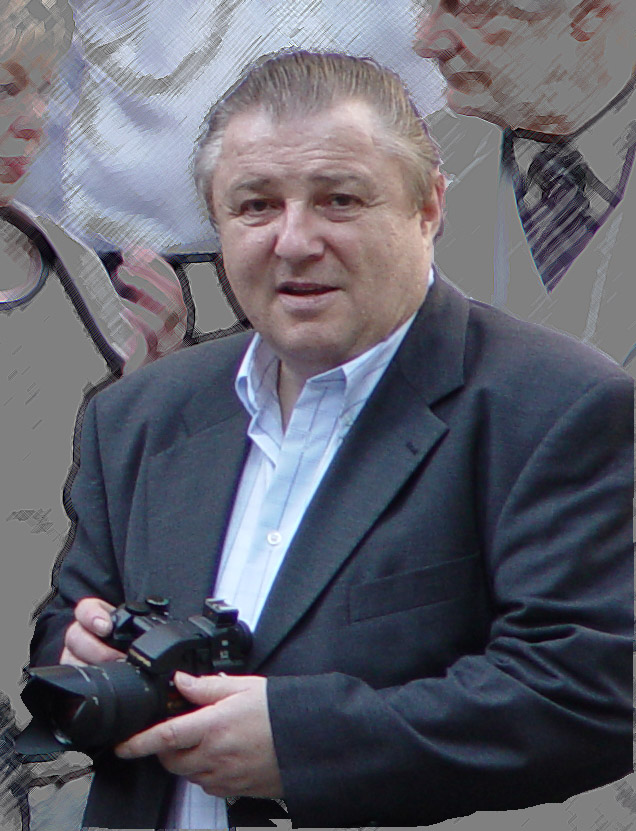 Peter Bräutigam - Portrait vom 21. September 2003, Leipzig, Thomaskirche